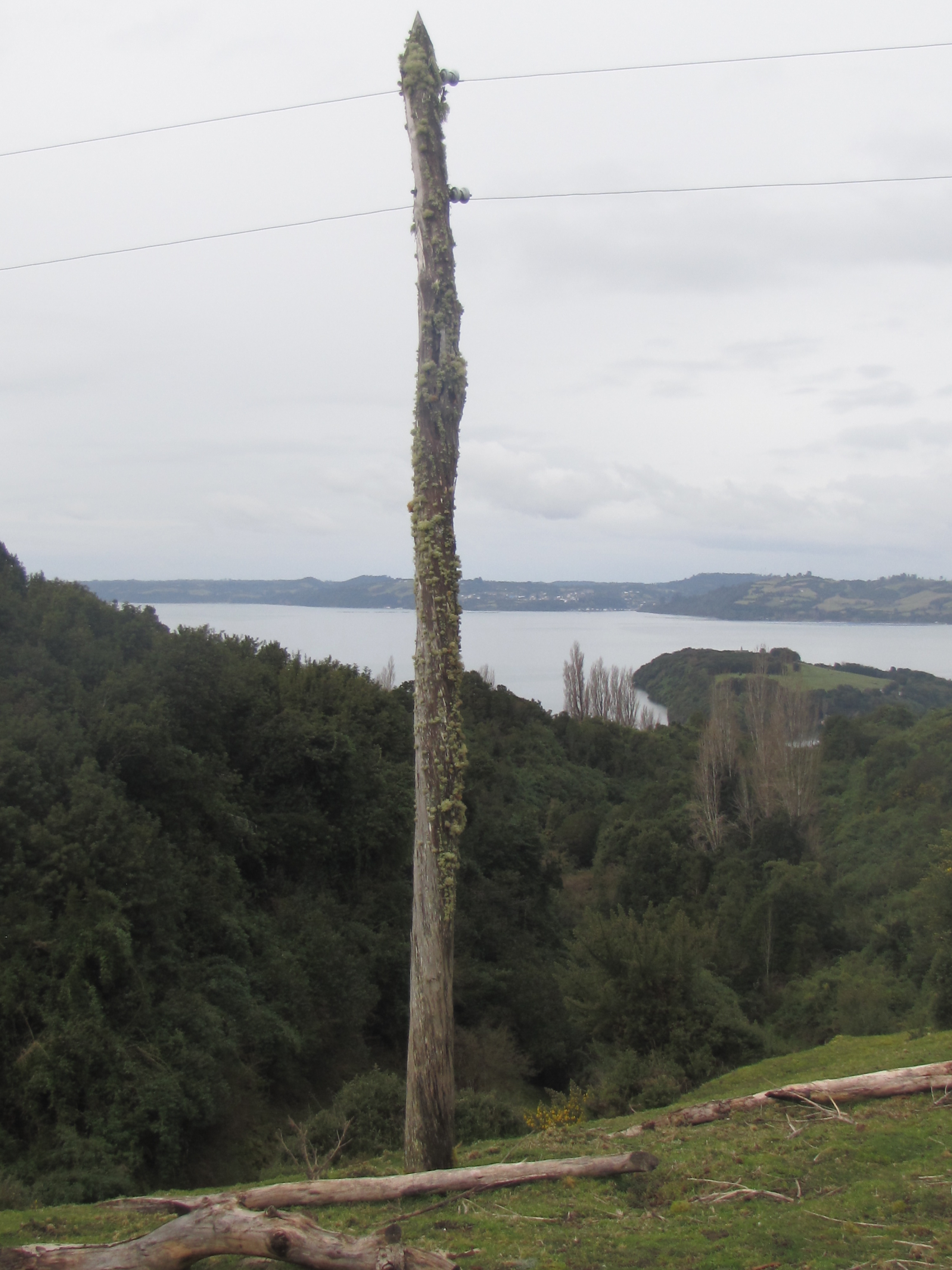 Poste de luz de ciprés de las Guaitecas en Quinched, Chonchi, Chile. Al fondo, Linlinao y Lemuy